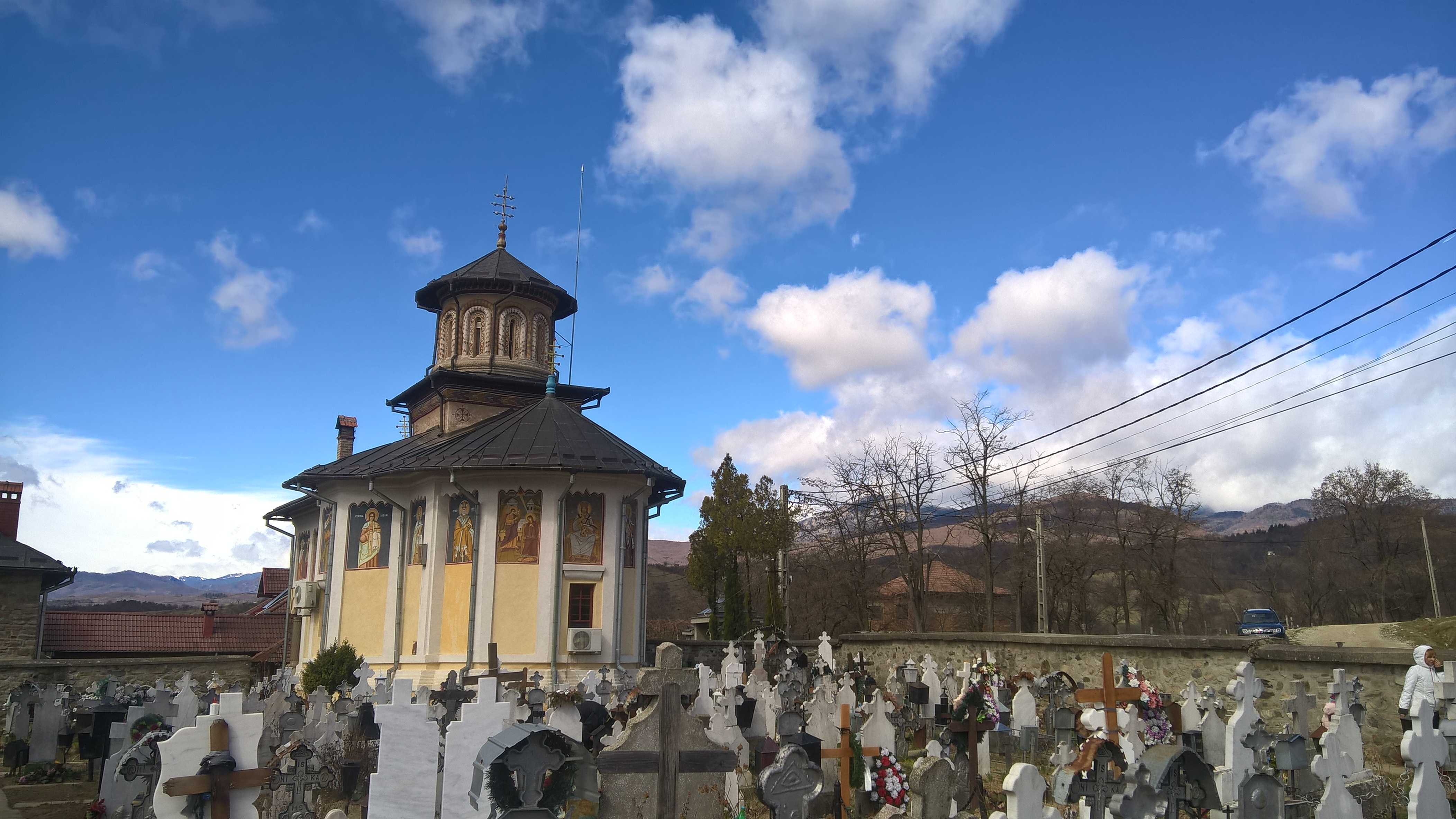 Fostul schit Scăuenim Biserica „Buna Vestire” și „Sf. Nicolae”- comuna Berislăvești, sat Scăueni; Str. Principală 70